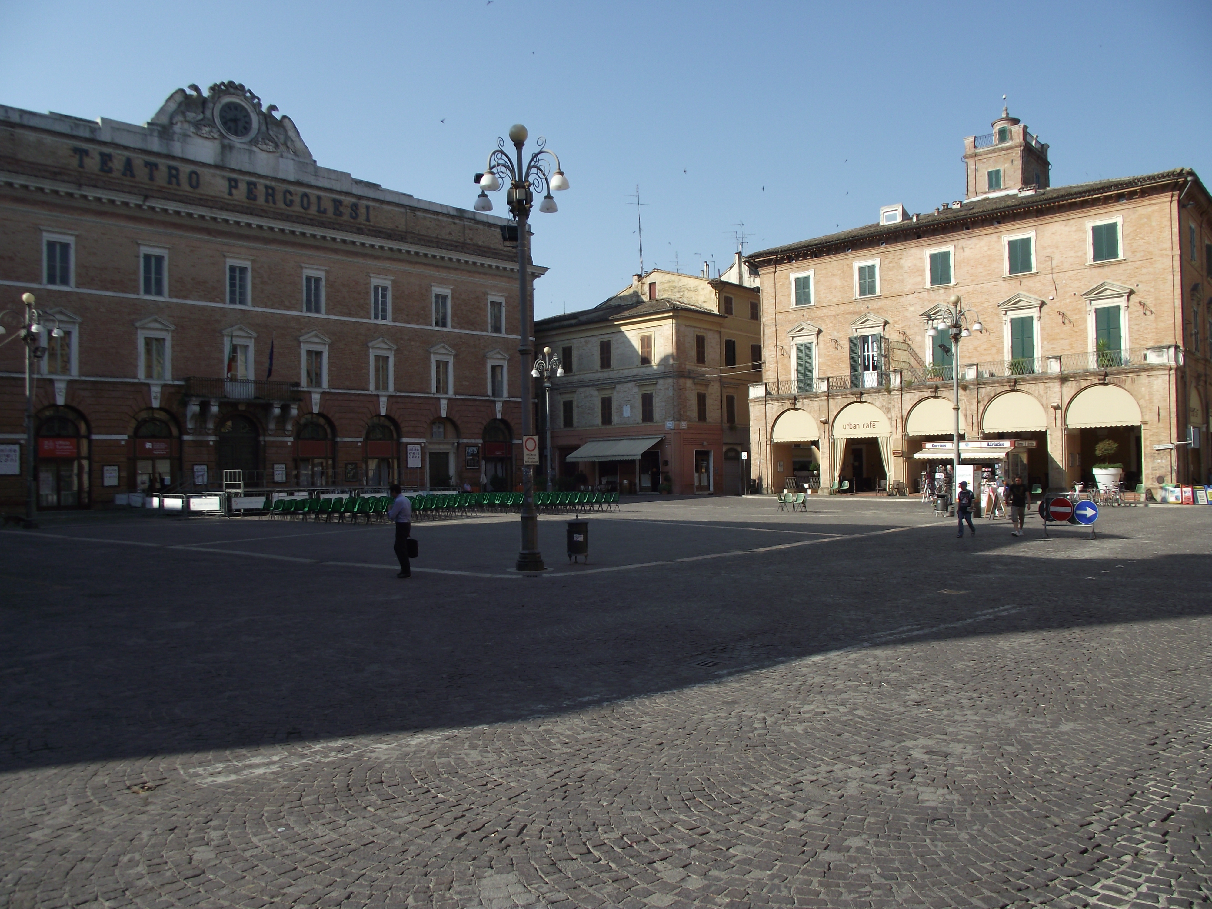 Teatro Pergolesi e Palazzo Magagnini.